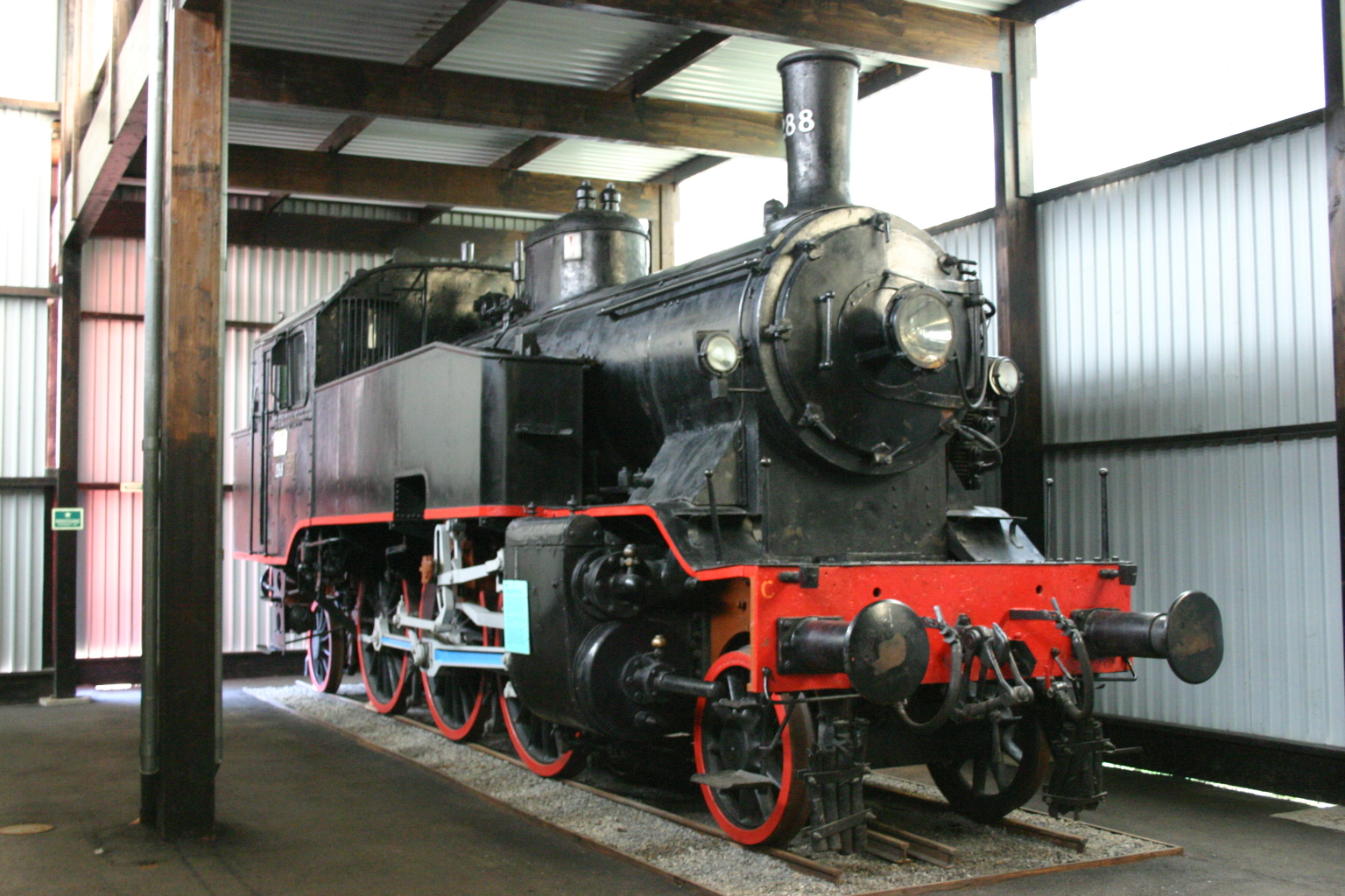 Dampflokomotive 32a 288 Hamar Norsk Jernbane-Museum 02.08.2004